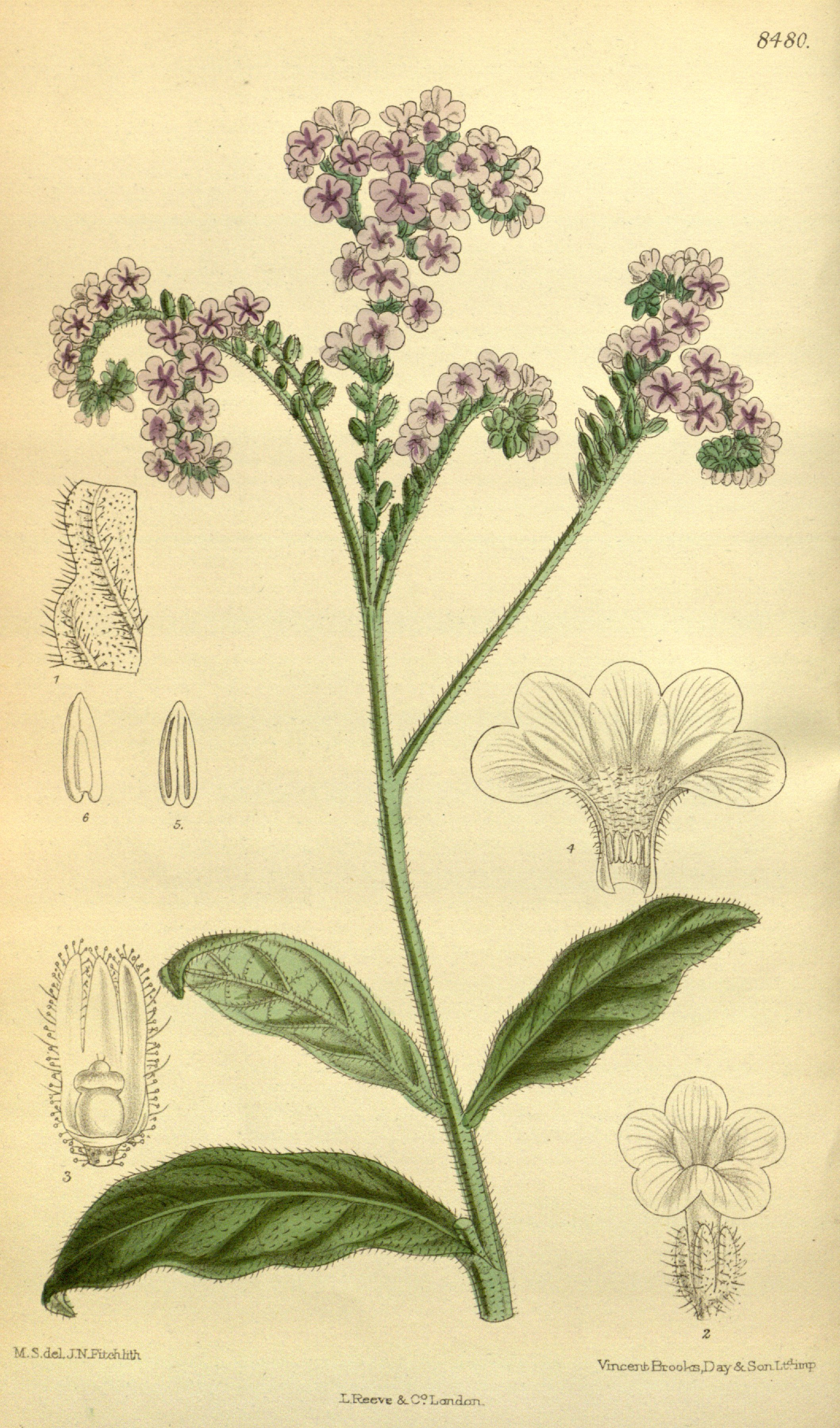 Heliotropium anchusaefolium (= Heliotropium amplexicaule), Boraginaceae